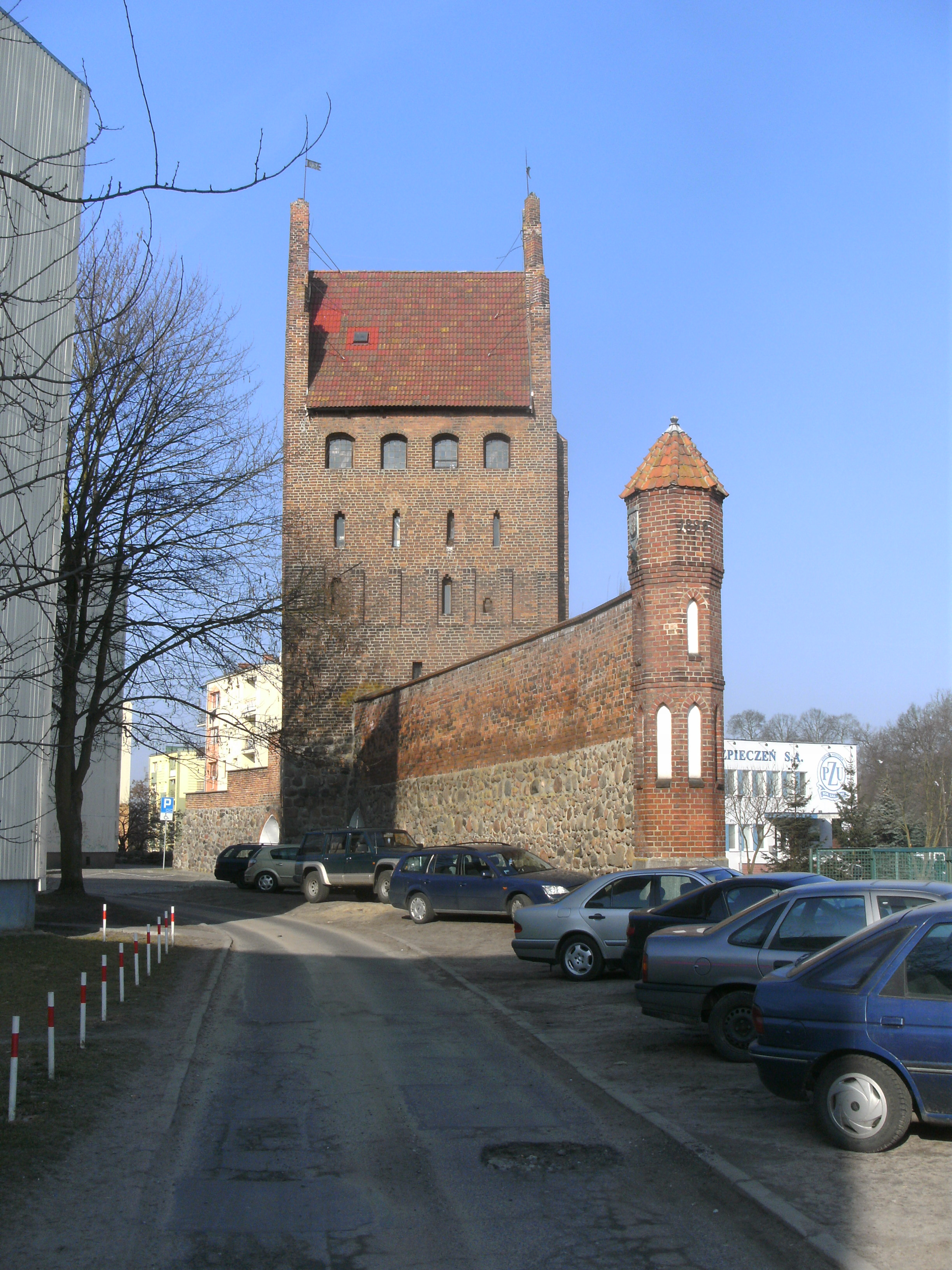 Goleniów (Gollnow) in Polen, Wolliner Tor von der Seite gesehen